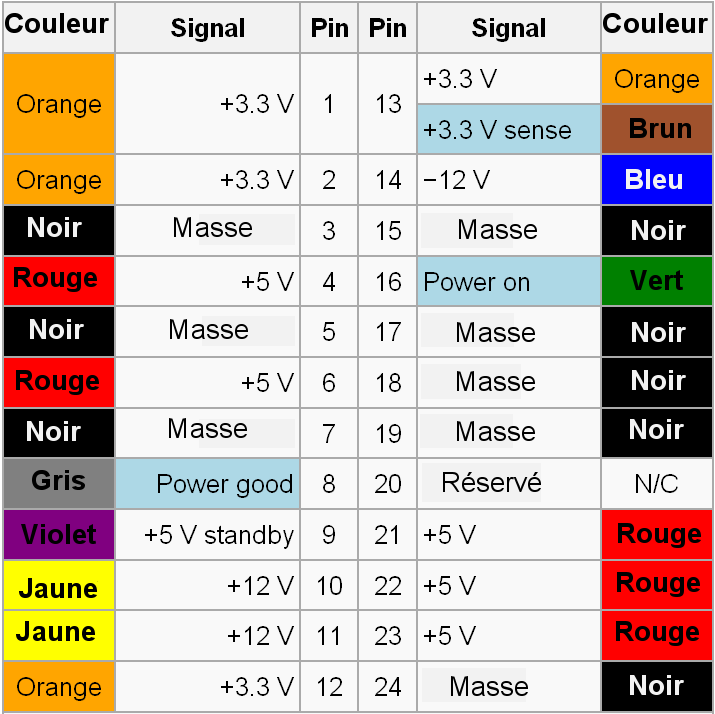 Schéma de fonctionnalité des broches d'alimentation ATX 24 pins d'ordinateur. Un schéma équivalent pour les broches d'alimentation ATX 20 pins existe aussi au nom de PowerSupplyUnit_20Pins.png